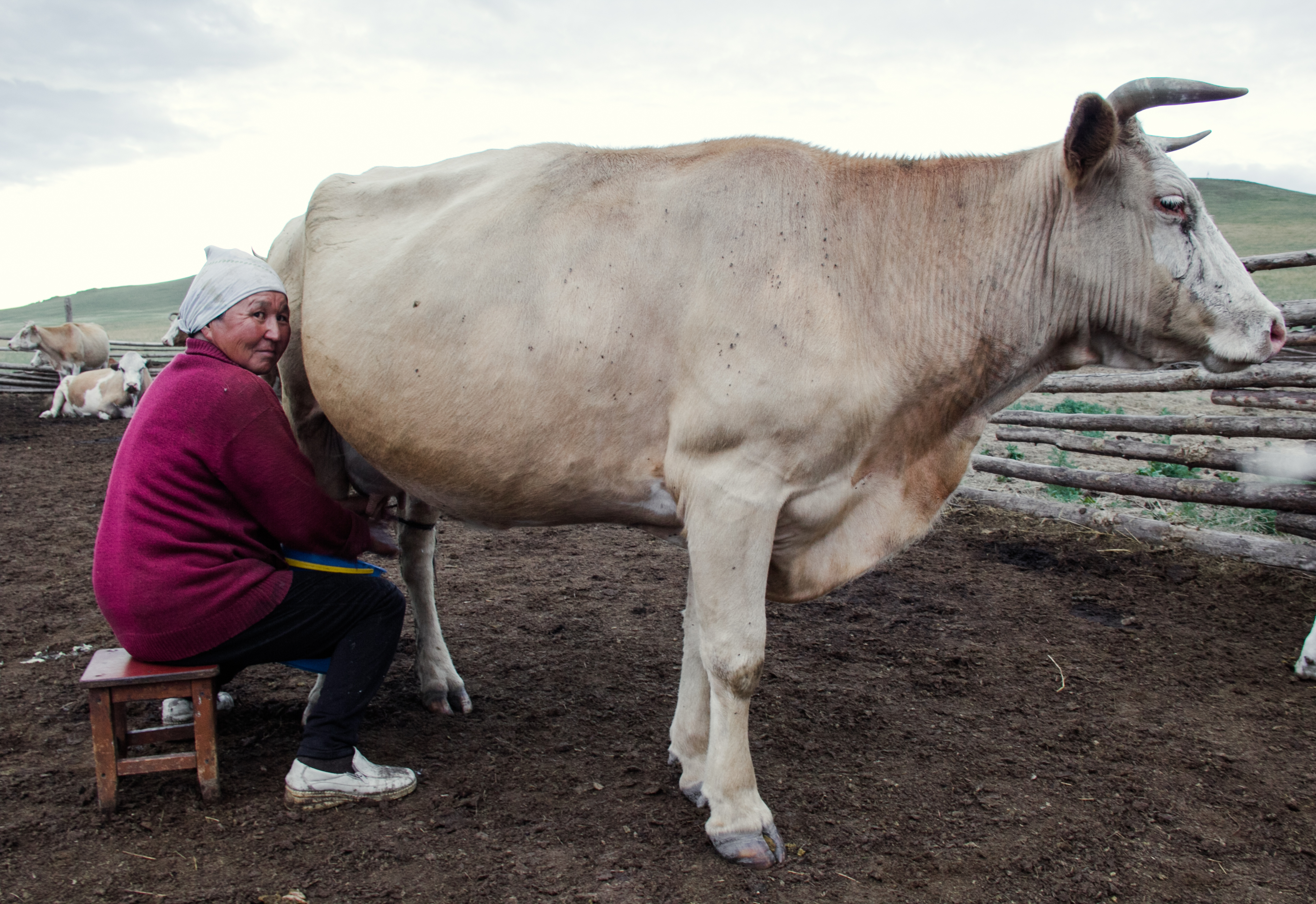 Сельская Россия